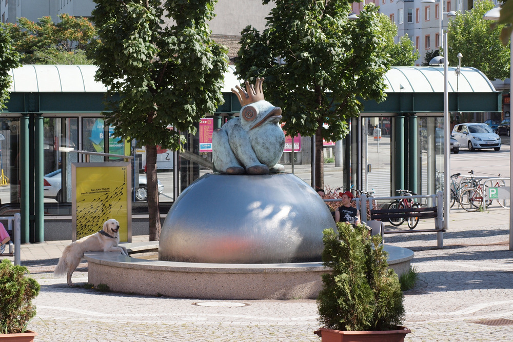 Froschkönigbrunnen Simmeringer Platz